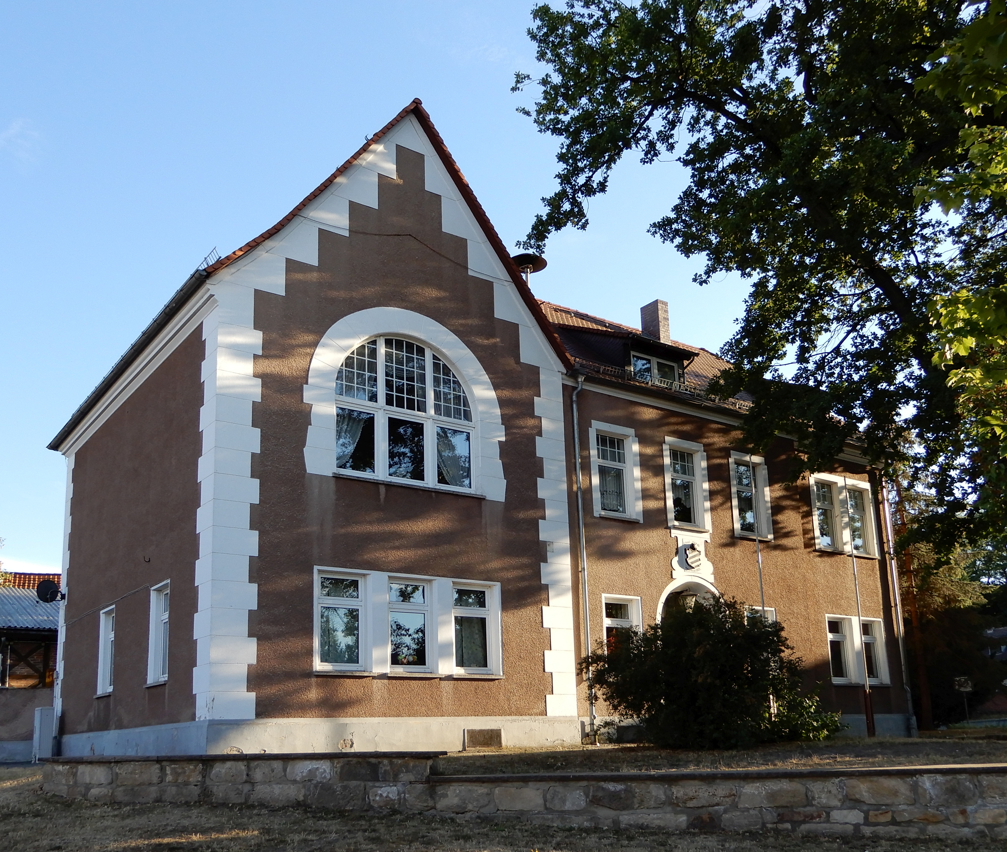 Rathaus Hoym